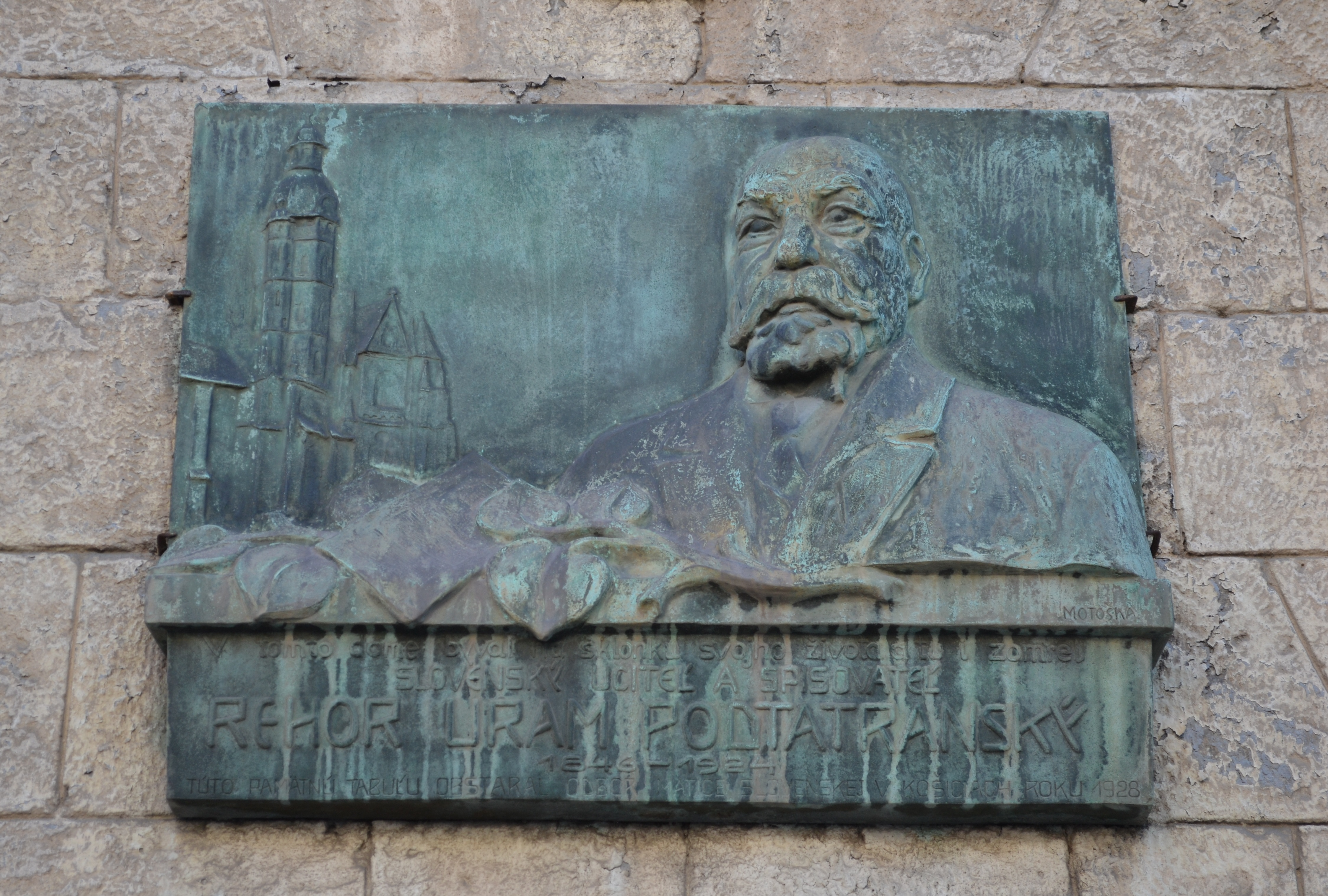 Pamätná tabuľa spisovateľa Rehora Uram-Podtatranského v Košiciach, Štefánikova ulica 4, Túto pamätnú tabuľu obstaral odbor Matice slovenskej v Košiciach roku 1928., autor: akad. sochár Frico Motoška